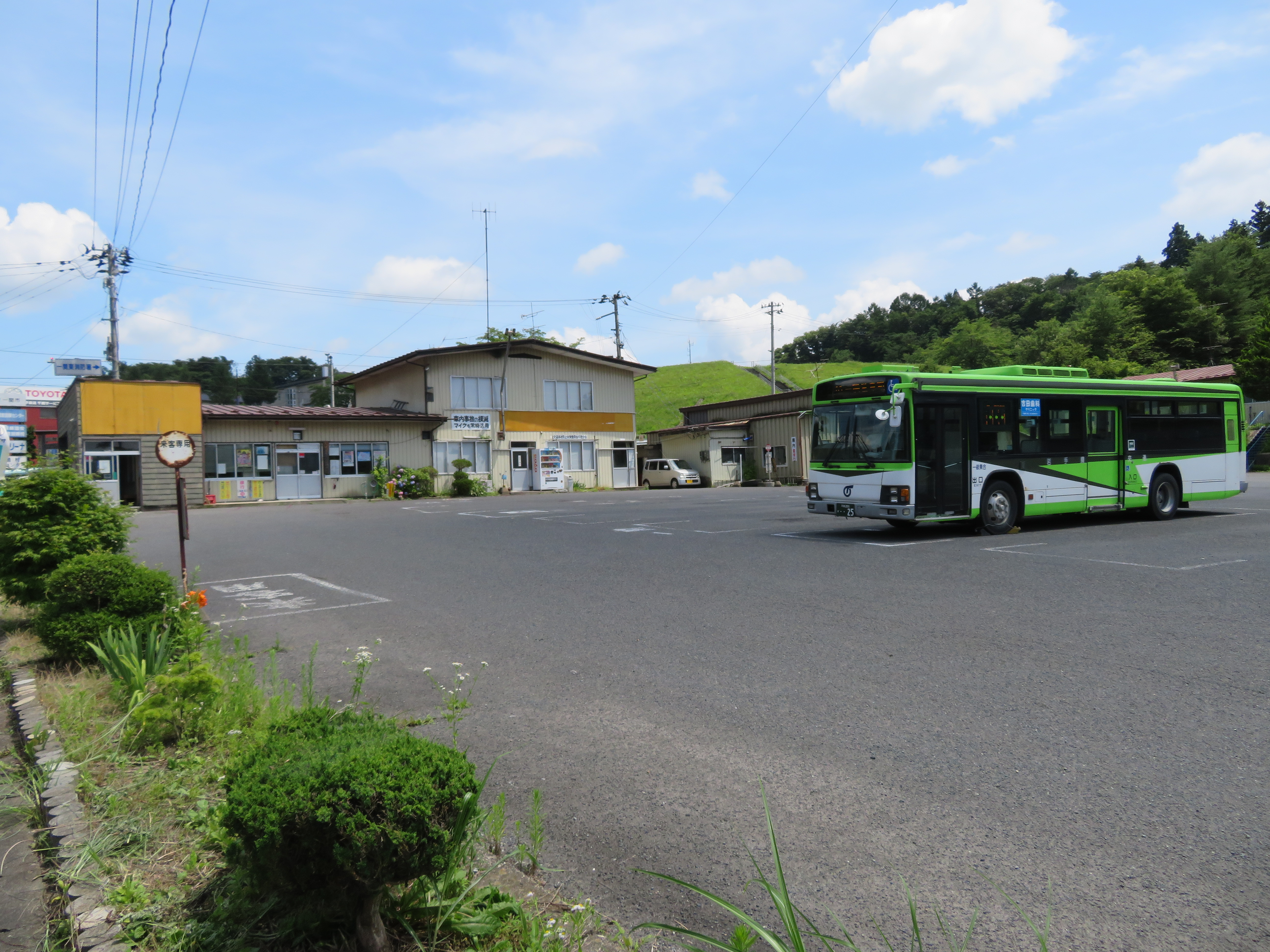 岩手県一関市に所在する千厩バスターミナル